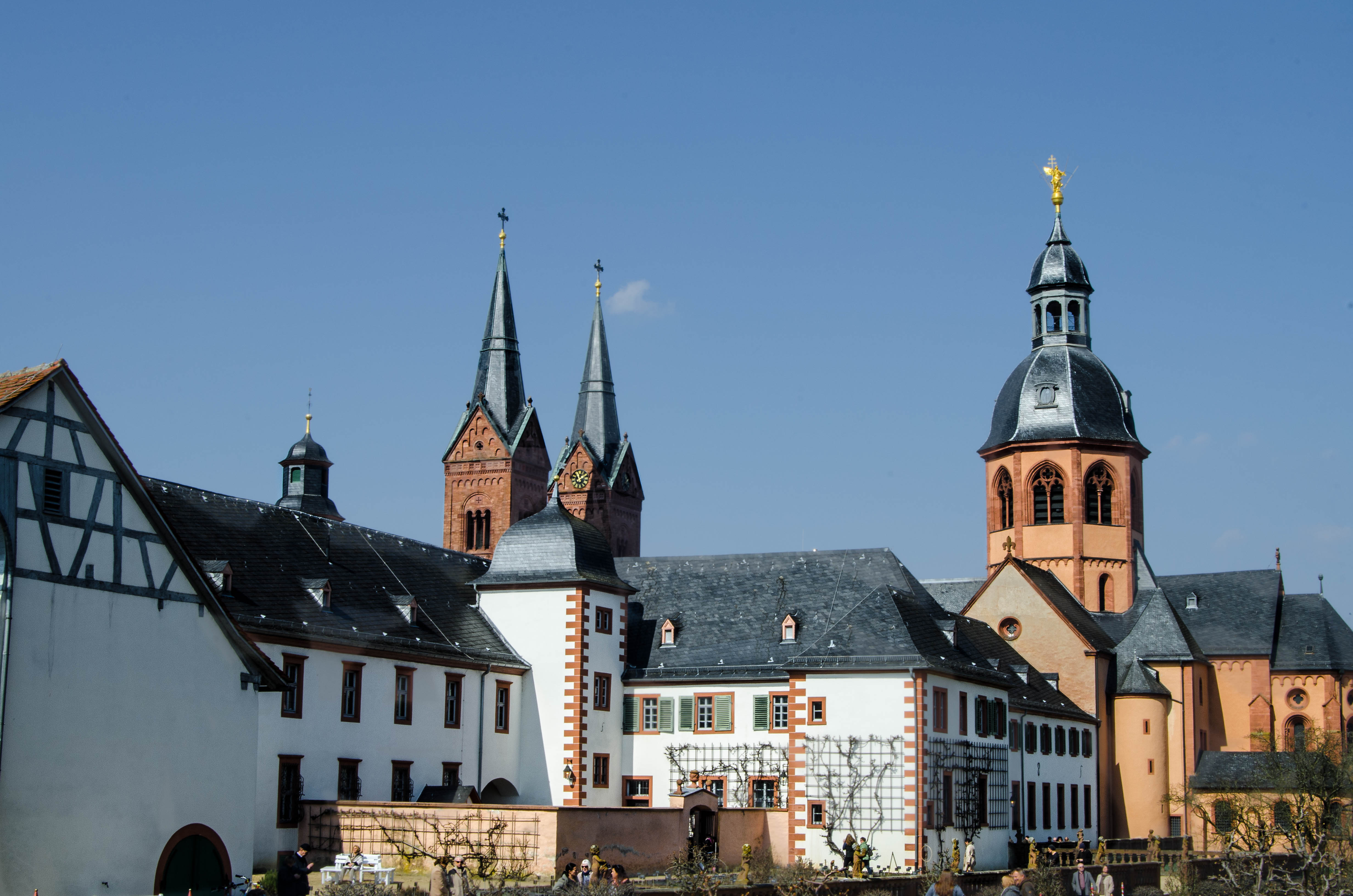 Basilika vom Benediktiner Park aus